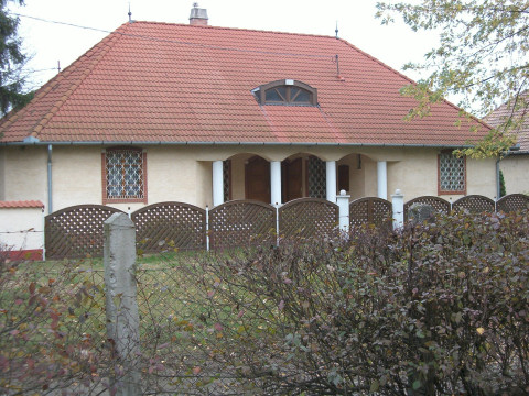 Parókia, Kakucs